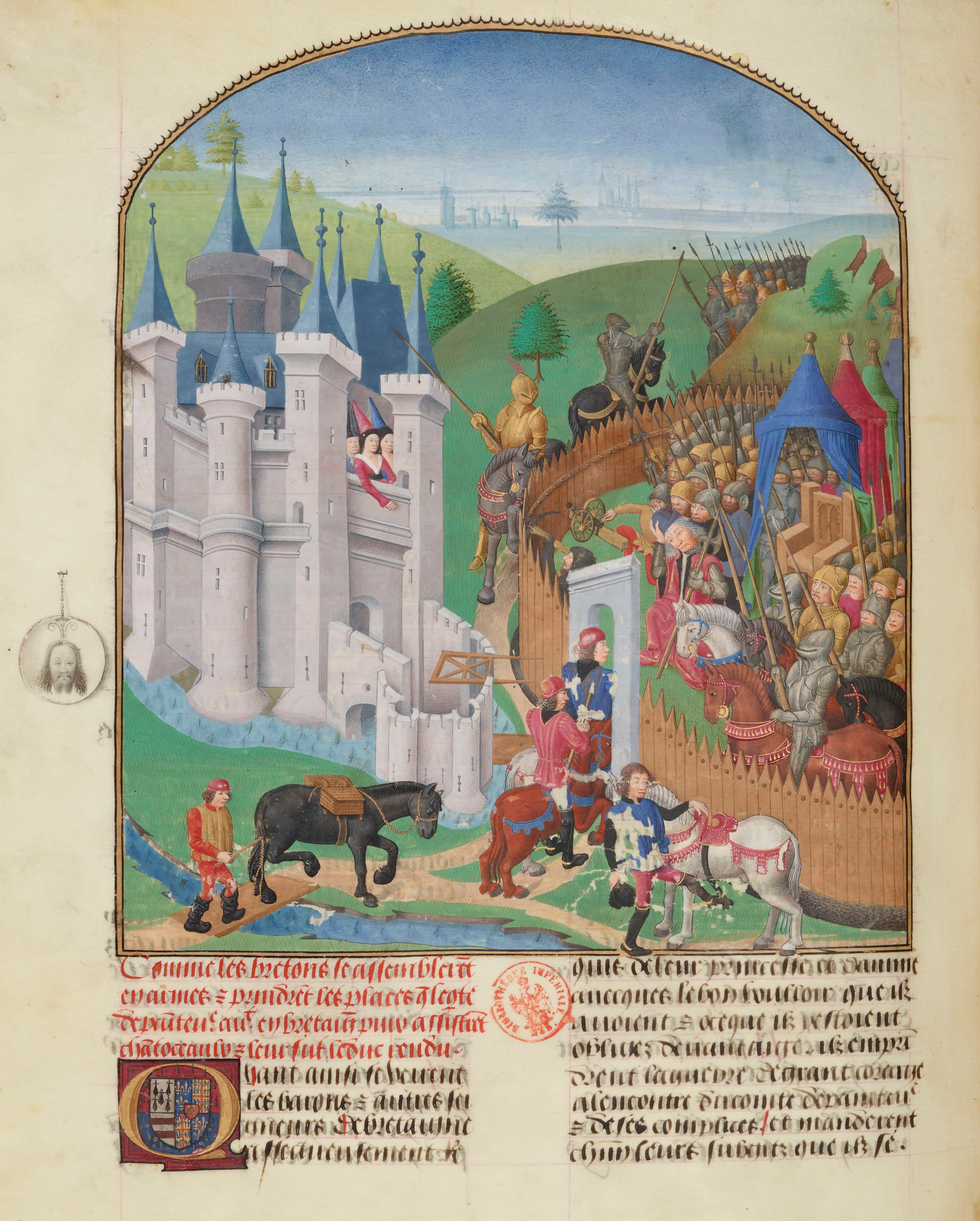 Enluminure incluse dans la Compillation des Cronicques et ystores des Bretons, partie en III livretz par Pierre Le Baud, secrétaire de Jean, sire de Derval.